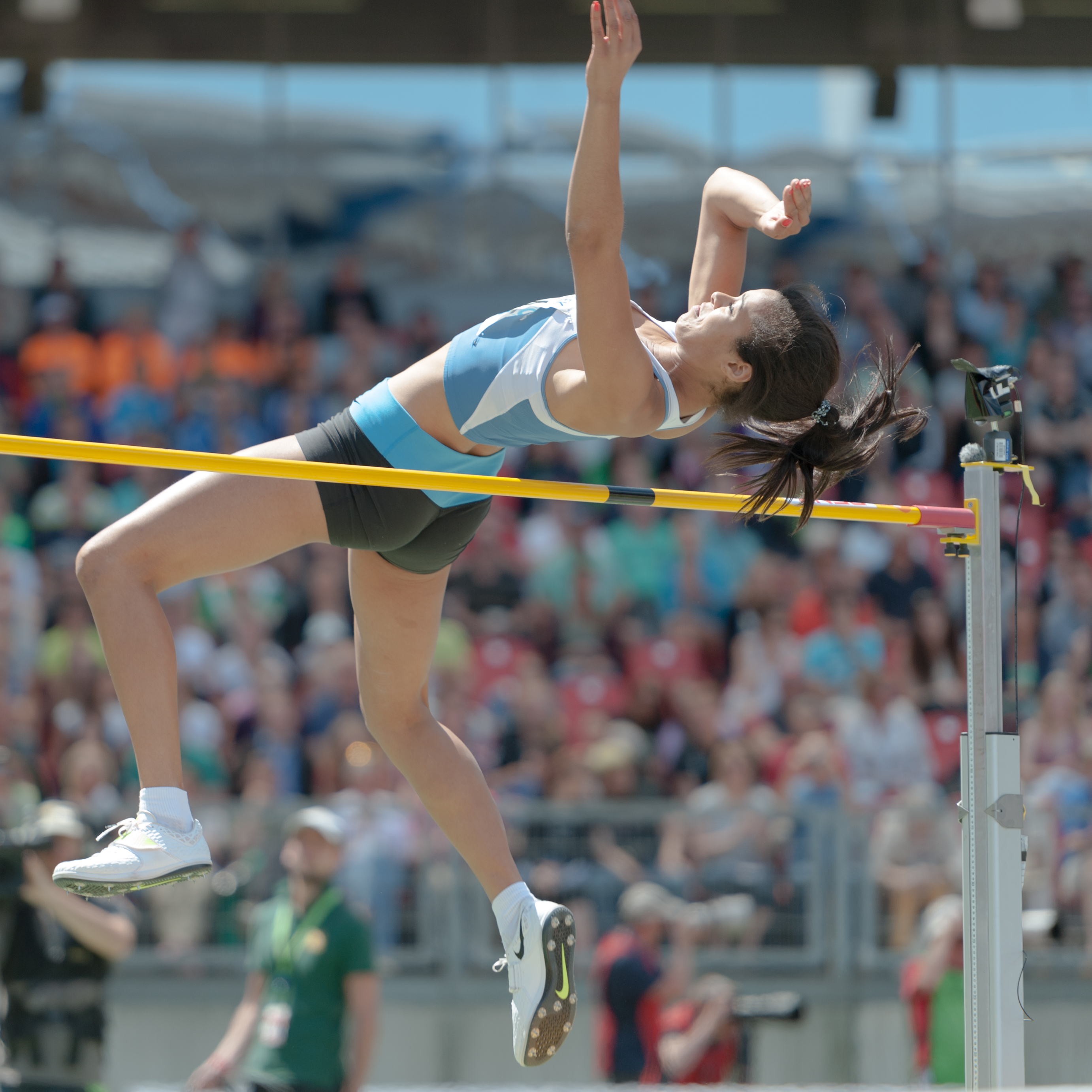 Deutsche Leichtathletik-Meisterschaften 2015: Frauen Hochsprung - Marie-Laurence Jungfleisch, LAV Stadtwerke Tübingen